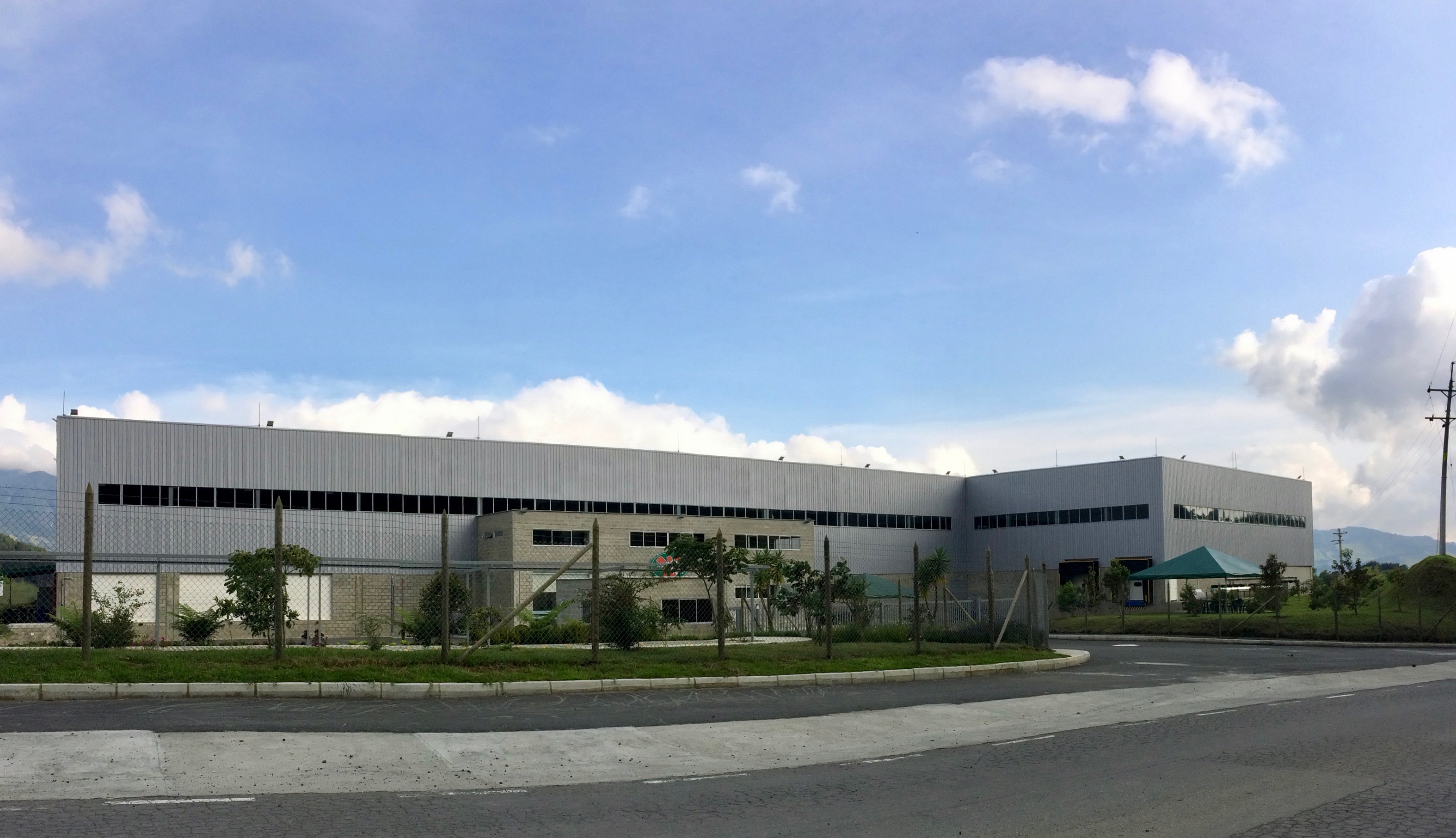 Planta procesadora de aguacates en Sonsón, Colombia.